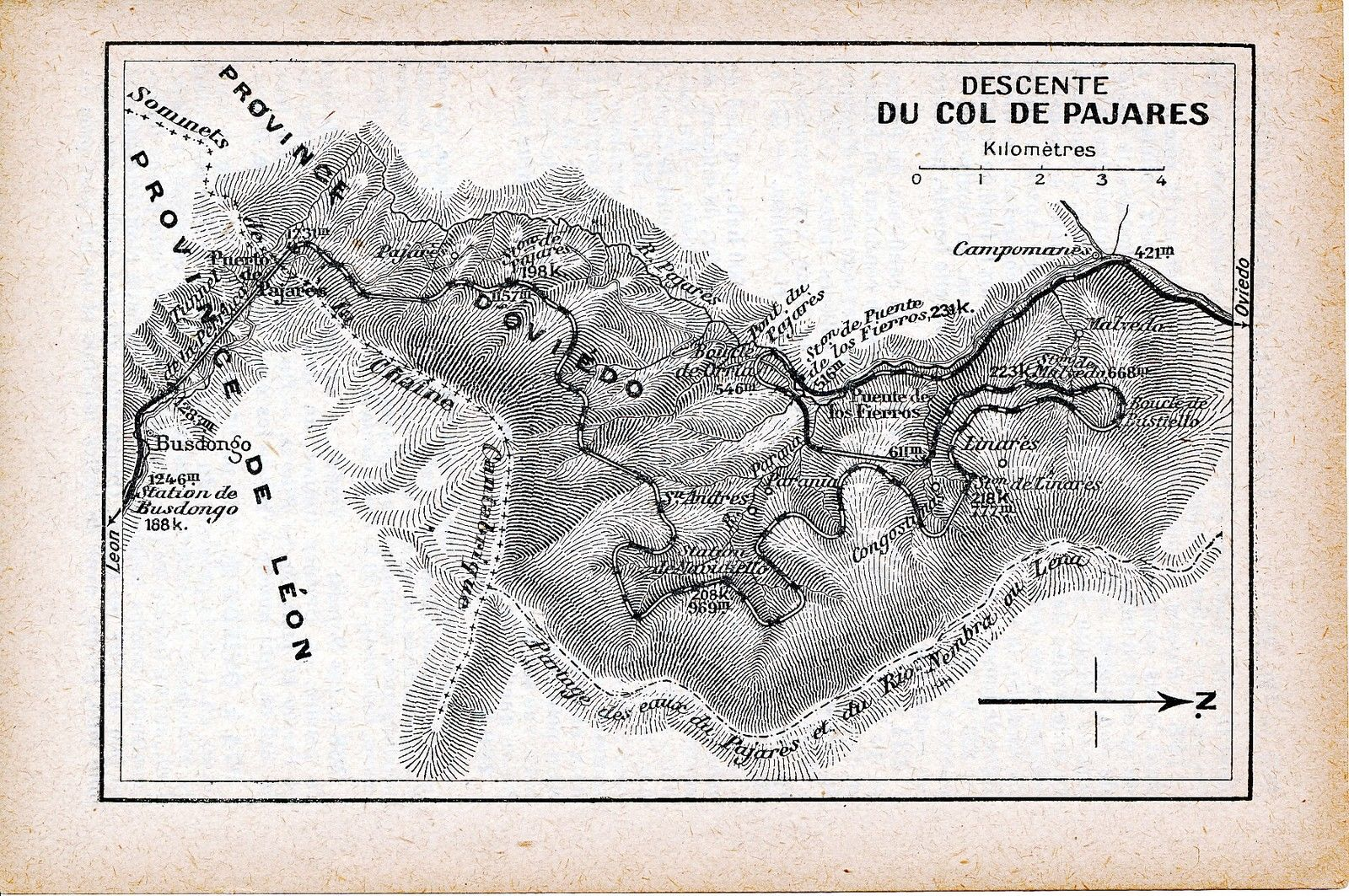 Carte du Col de Pajares (Espagne) contenue dans le Guide Joanne d'Espagne et Portugal de 1915.